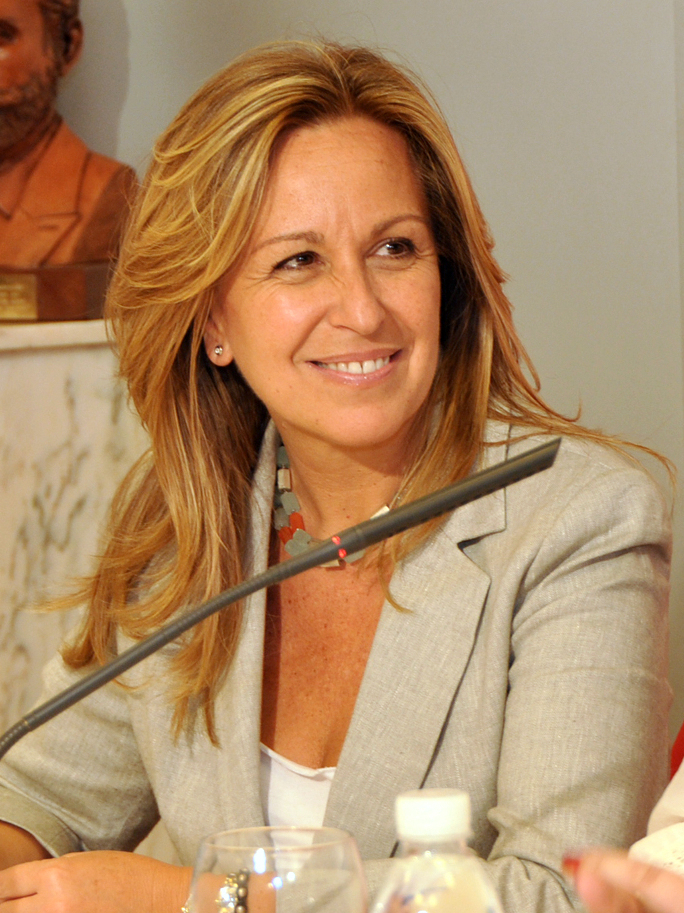 Acto con la militancia de Pinto